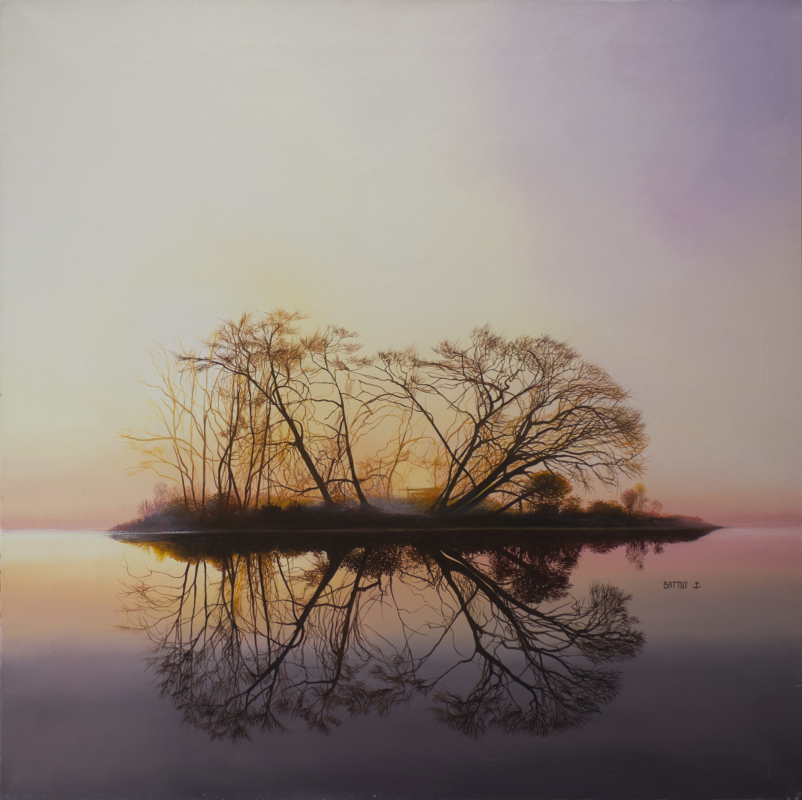 "Une île" 100x100 cm